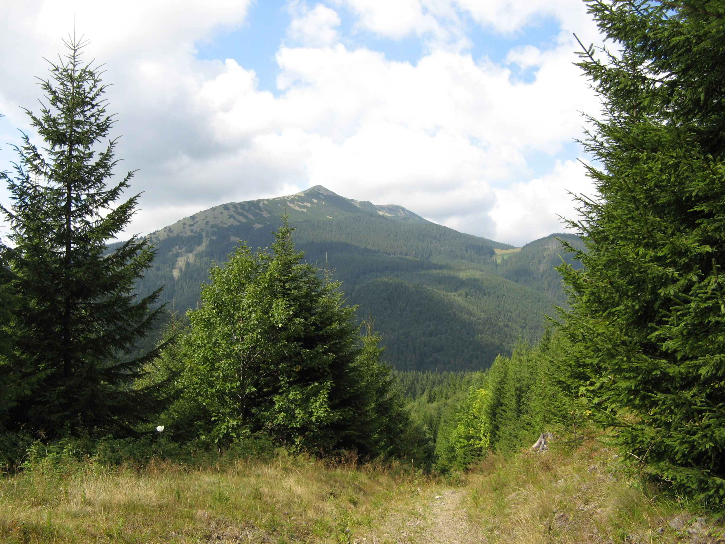 Заповідник Ґорґани, вид на Добошанку при спуску з Малого Ґорґана